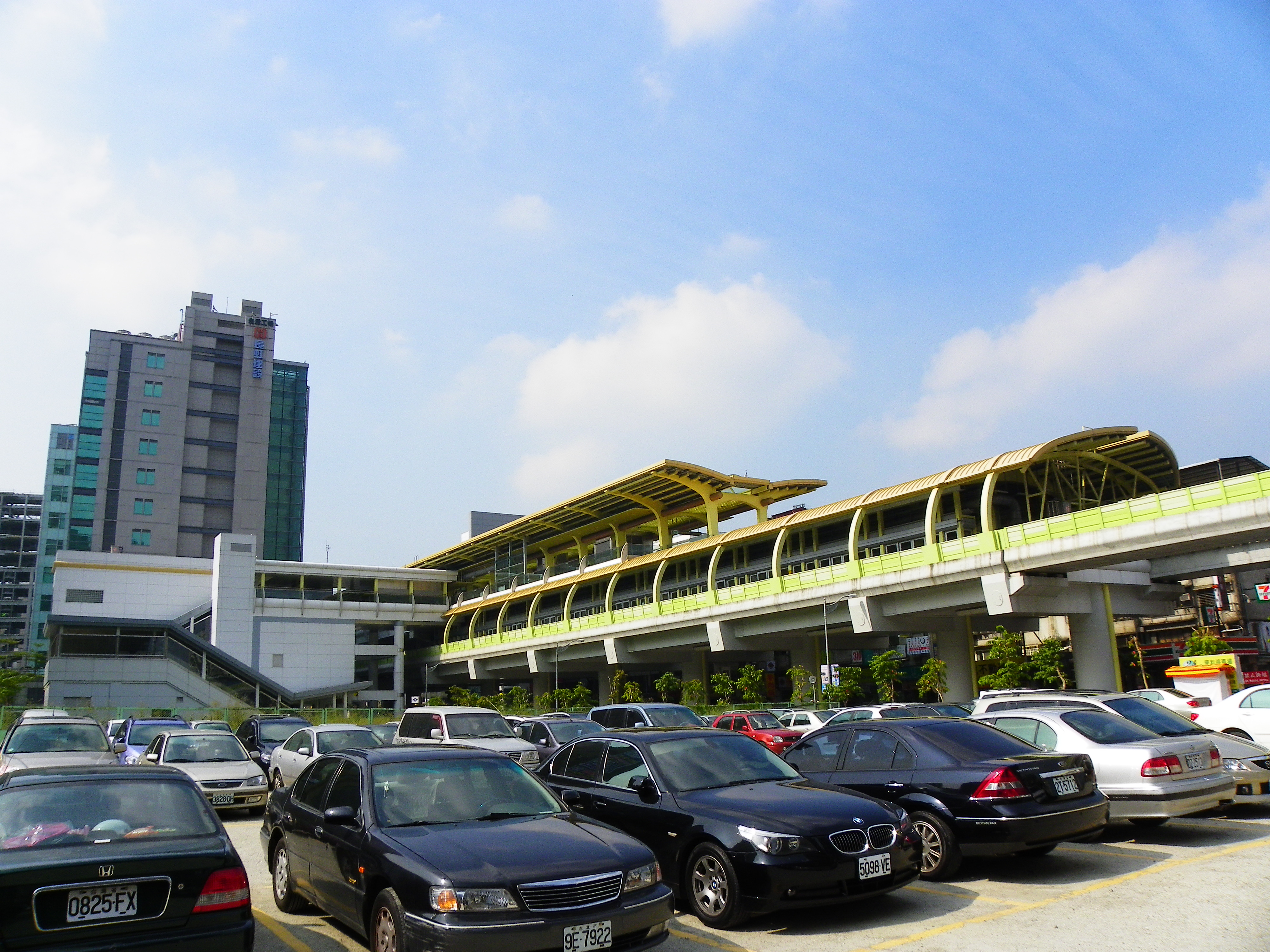 台北捷運内湖線西湖駅駅舎。